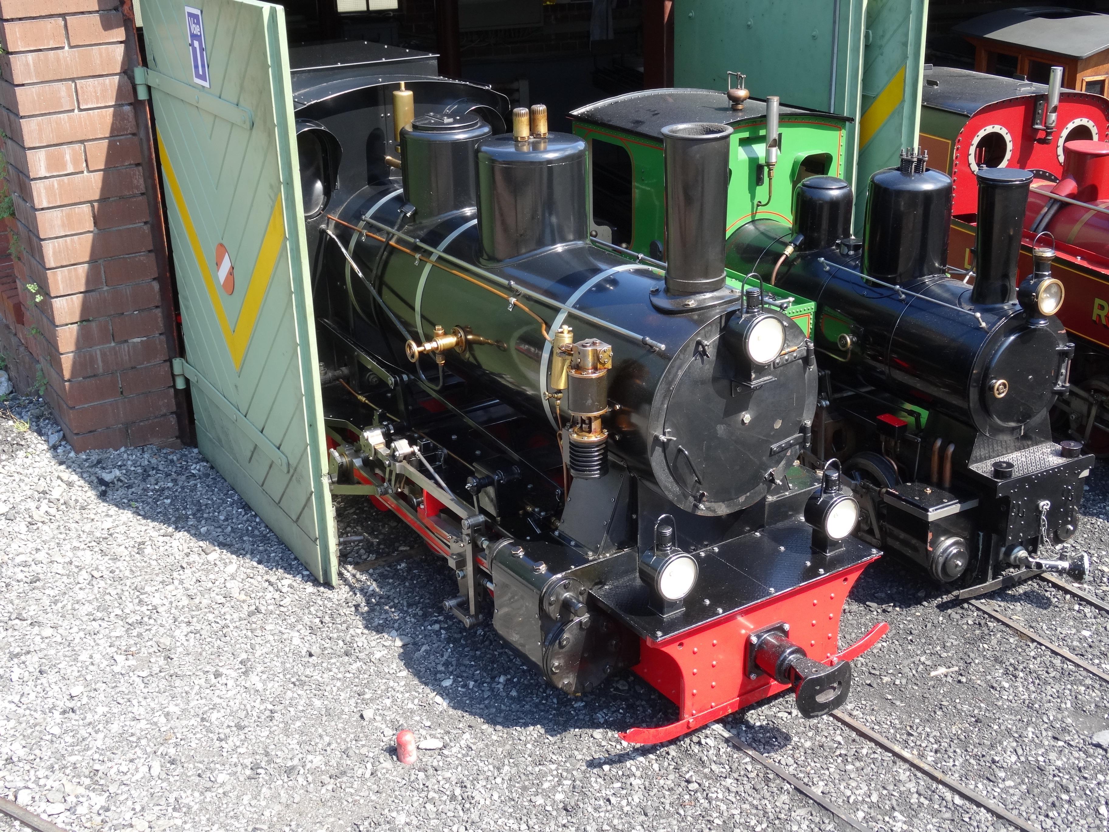 La Mecklenburg du Swiss Vapeur Parc au Bouveret